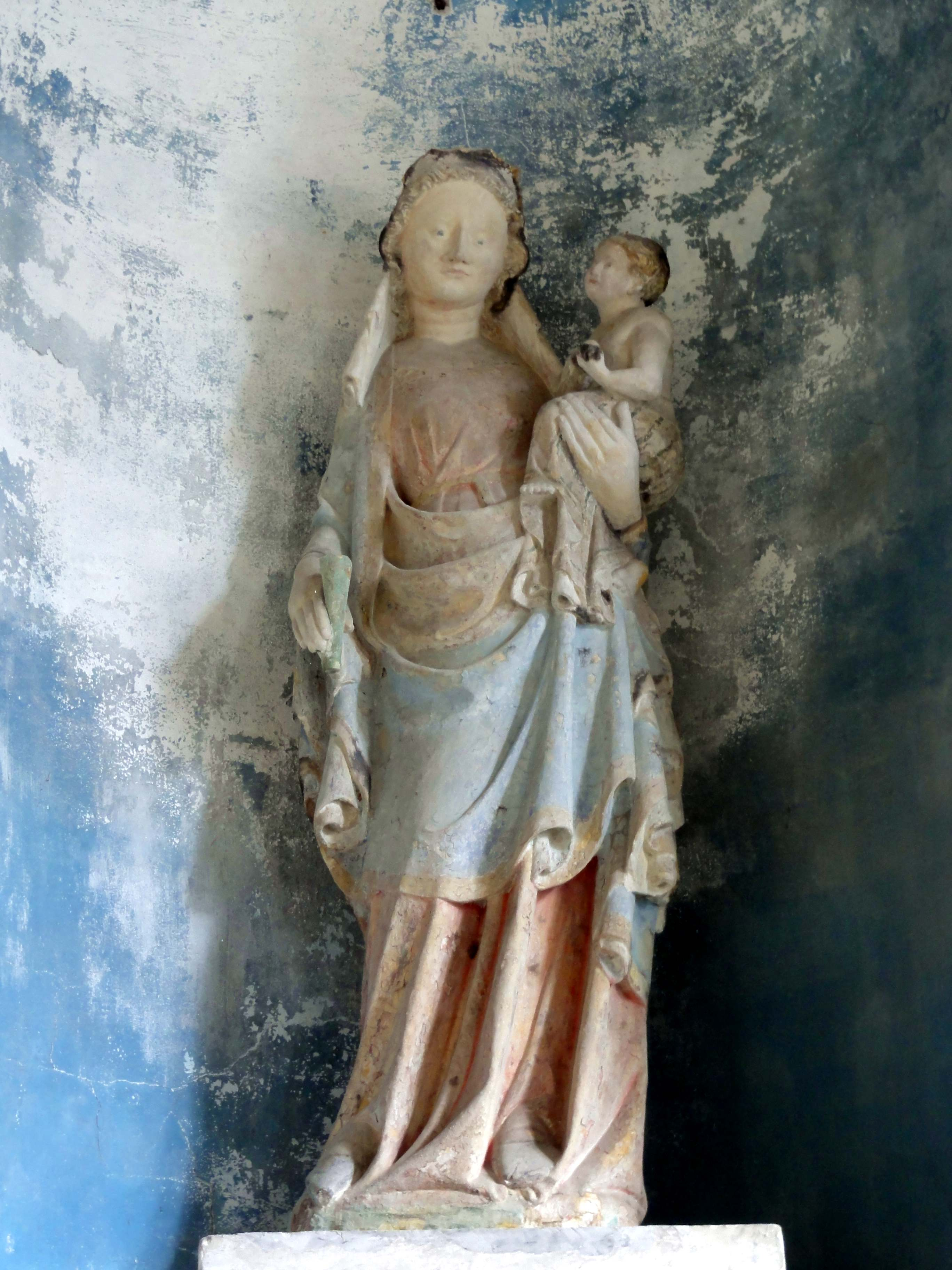 Vierge à l'Enfant du XIVe siècle.